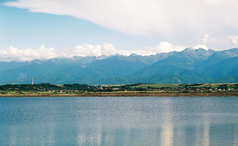 Olt river